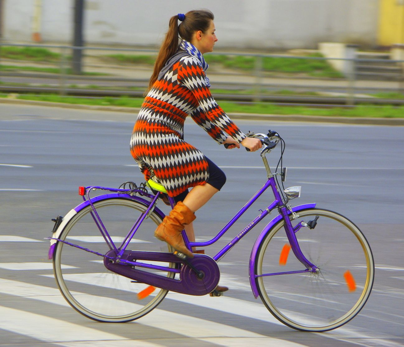 Szykowna rowerzystka na ulicach Łodzi